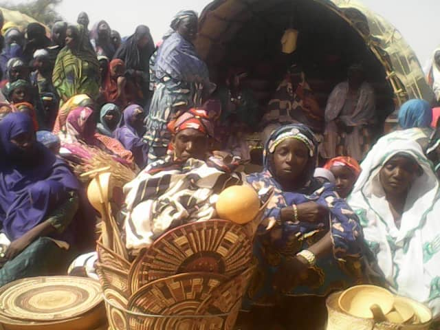 Wikichallenge 2019 Niger